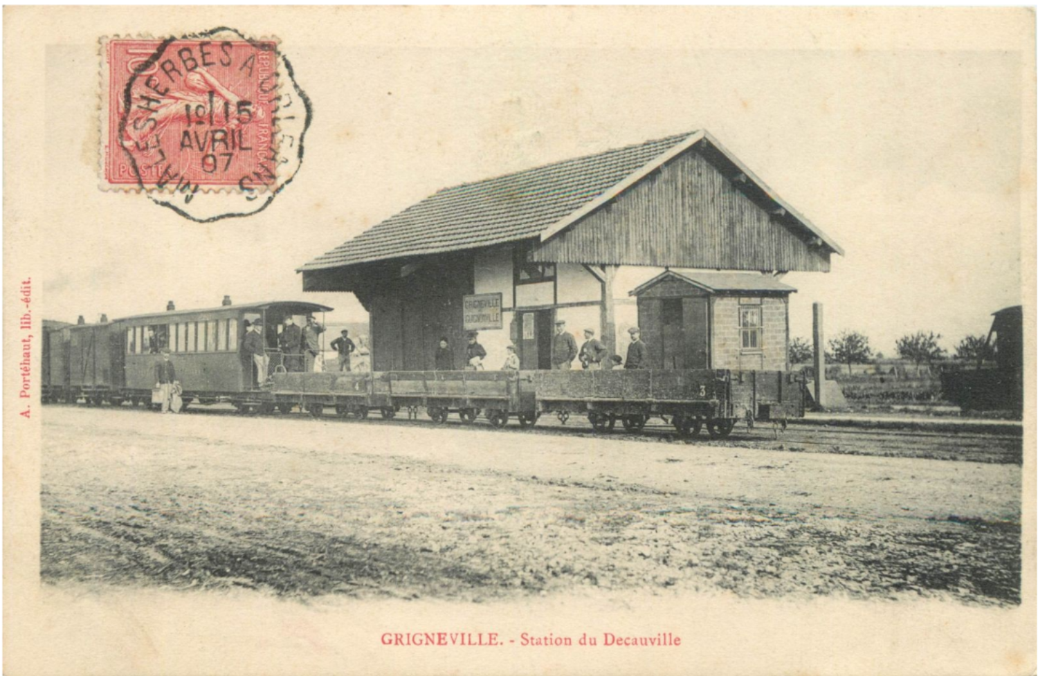 Grigneville - Station du Decauville